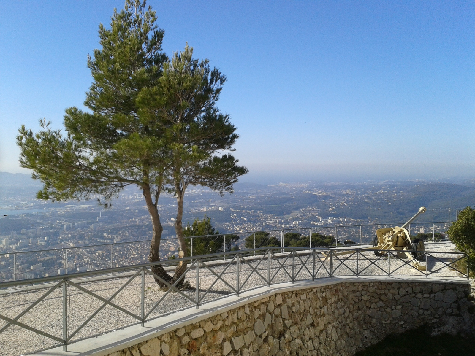 panorama exceptionnel sur la côte varoise